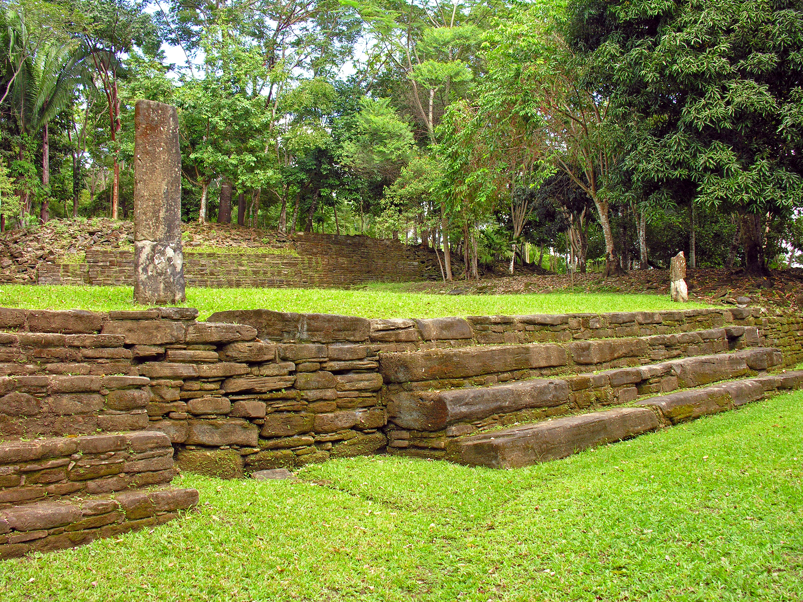 Structure 24 Ninki Pec Plaza